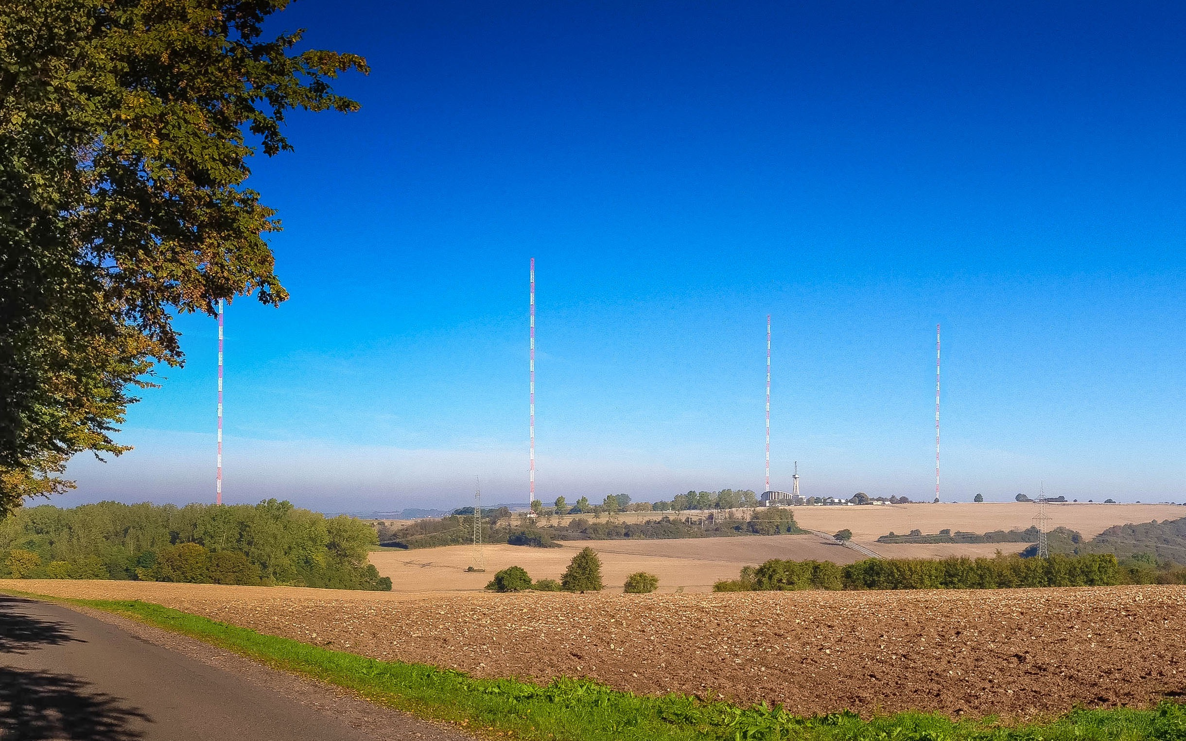 Sendeanlage von Berus aus fotografiert.